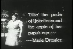 Placa de la película de Charles Chaplin Mabel´s Punctured Romance